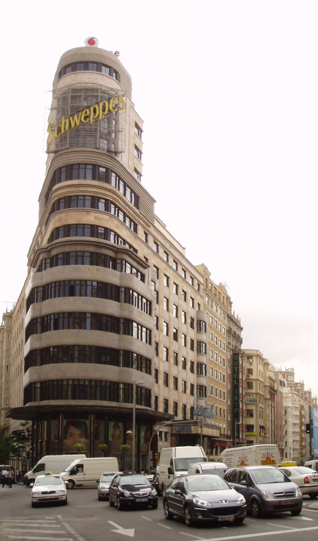 Edificio Carrión, o Edificio Capitol, en la Gran Vía, Madrid, España